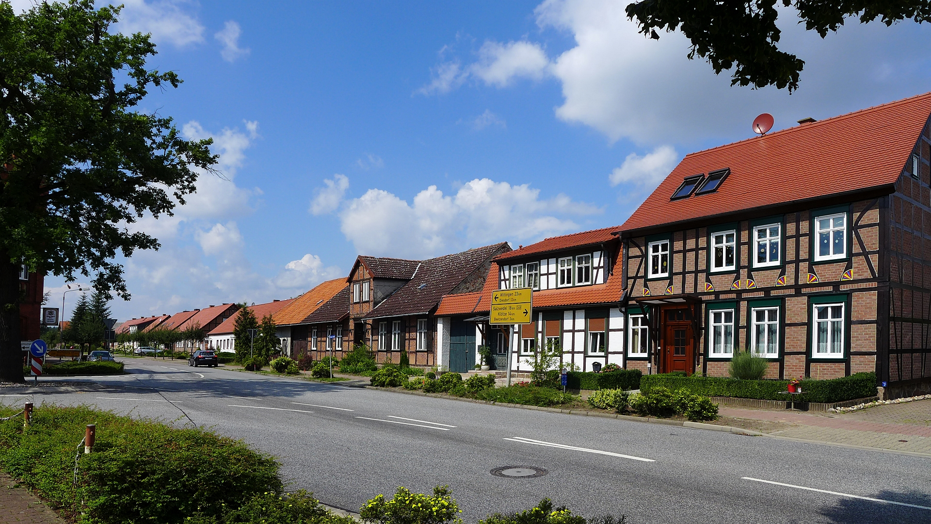 Rohrberg im Altmarkkreis Salzwedel, Hauptstraße mit Fachwerkhäusern. Ansicht 08-2014.